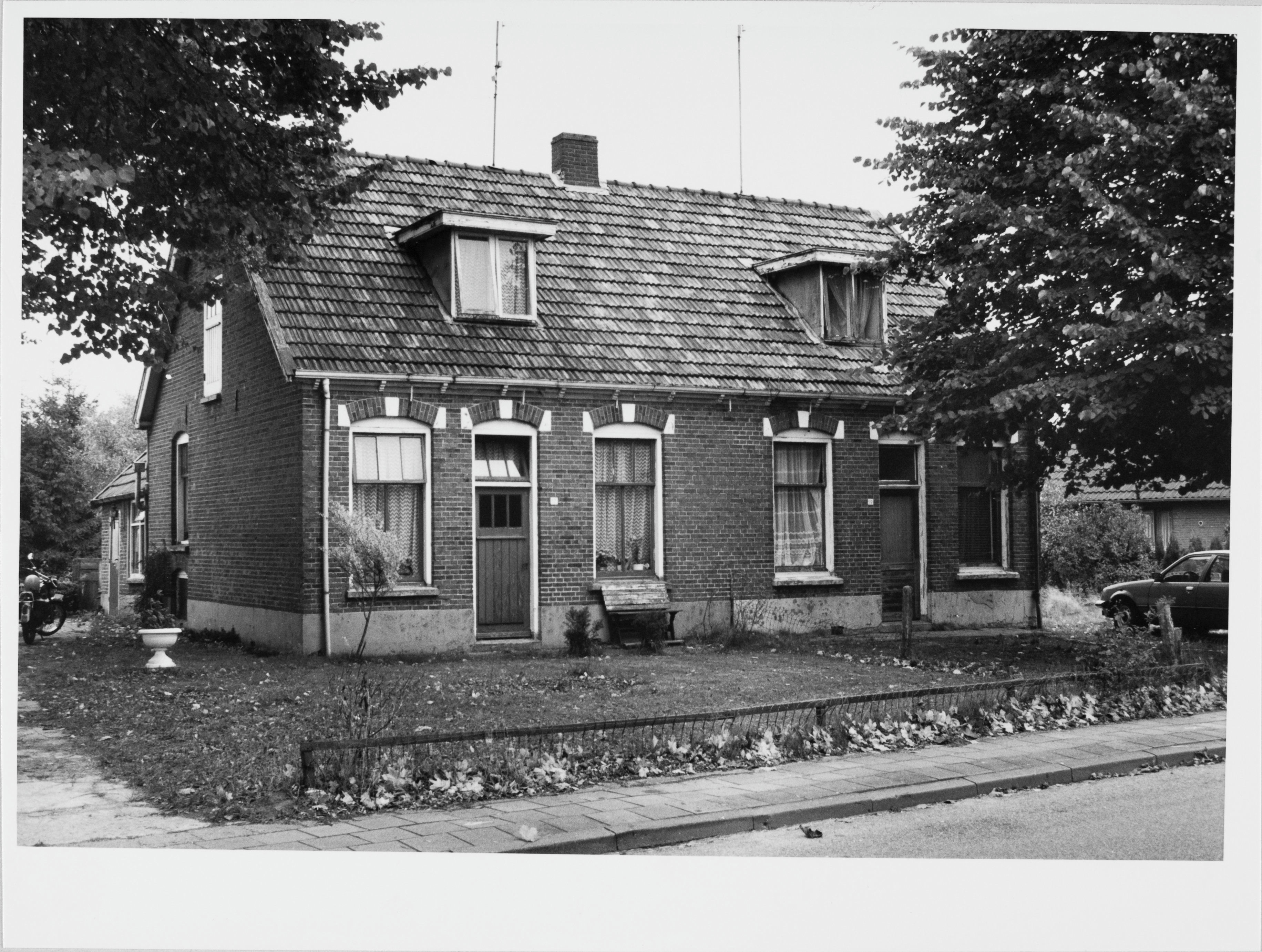 Overzicht van dubbele arbeiderswoning Kerkhofweg 17-19 (opmerking: Afdrukken verkregen via Ypie Attema, oud medewerkster van de Rijksdienst voor de Monumentenzorg.)